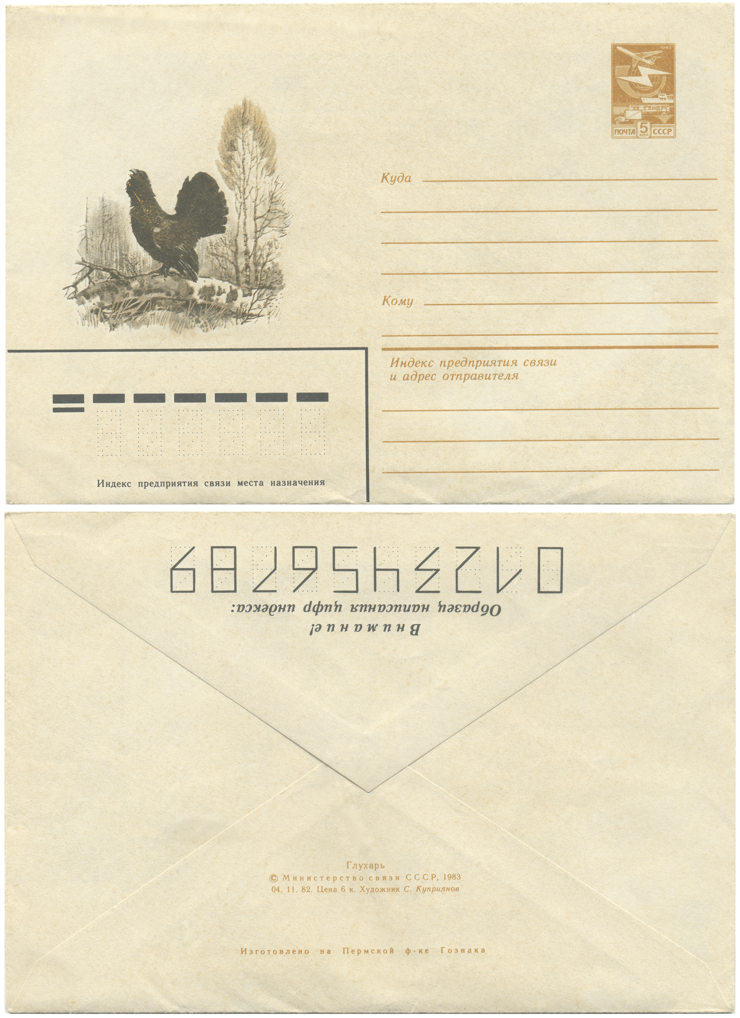 Почтовый конверт СССР с изображением глухаря